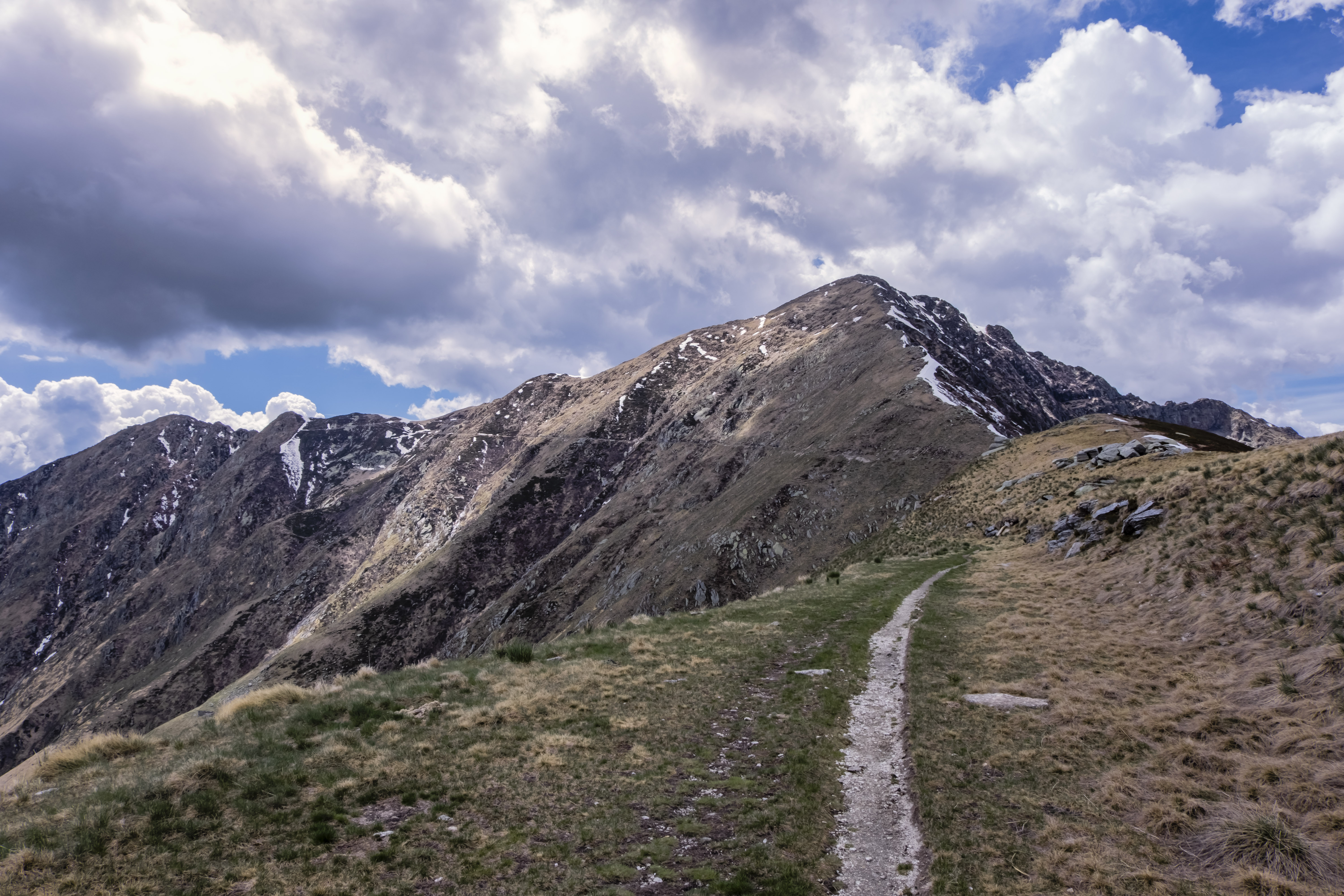 parco nazionale della Val Grande (Q358729)